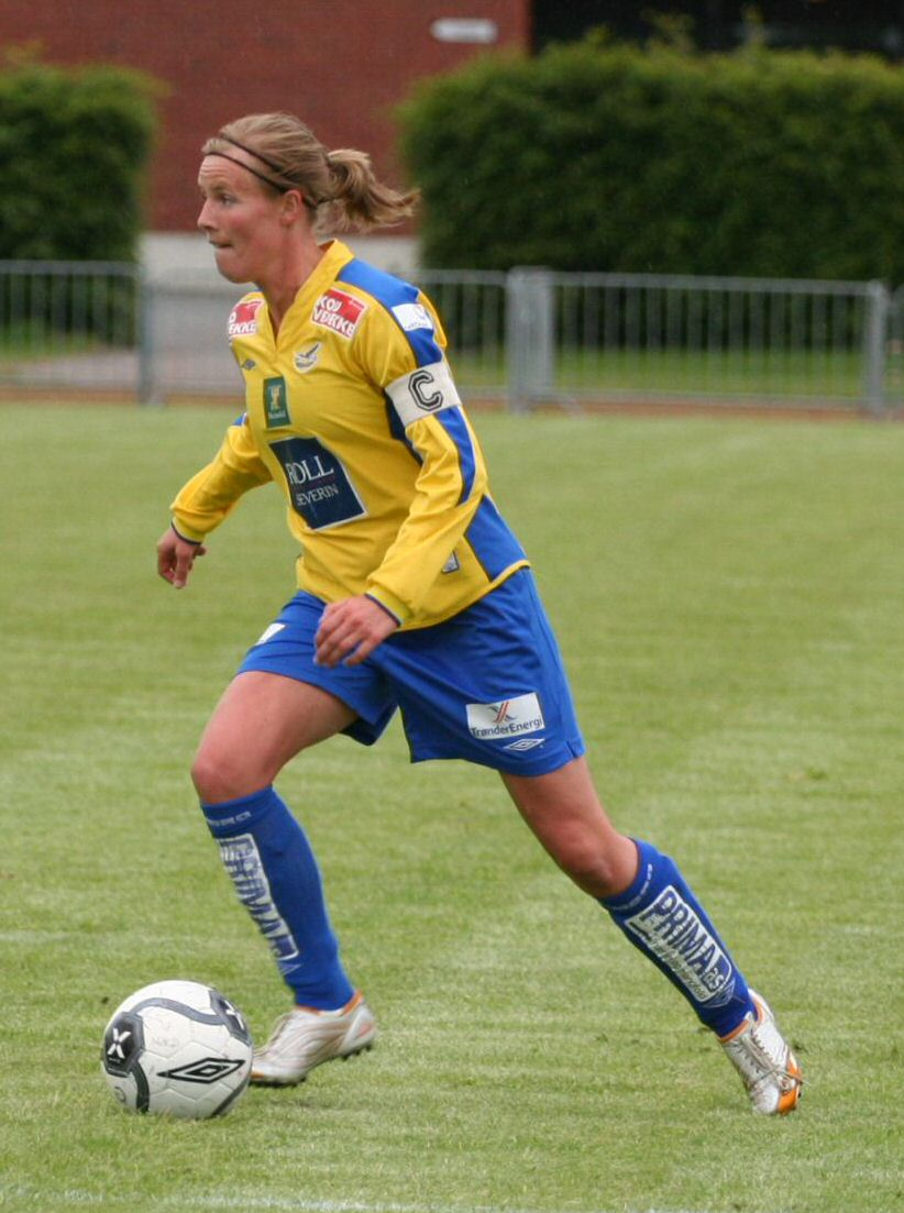 Fotballspilleren Unni Lehn